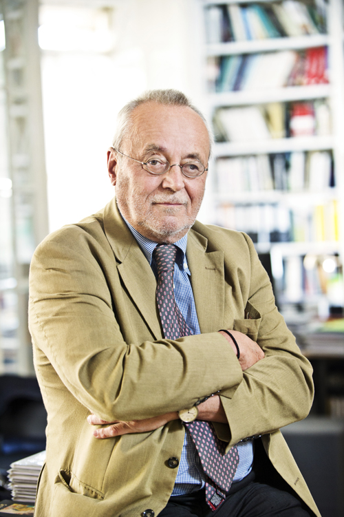 Christian Brandstätter (* 21. September 1943 in Lambach, Oberösterreich); österreichischer Verleger, Herausgeber, Autor, Kunstsammler und Gründer des Christian Brandstätter Verlags in Wien.